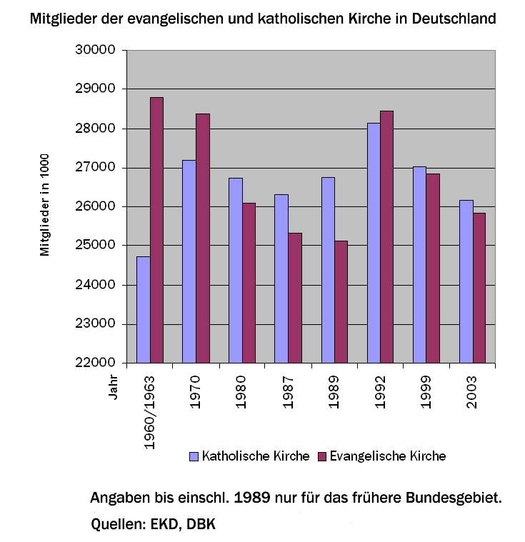 Anzahl der Mitglieder der evangelischen und katholischen Kirche in Deutschland. GNU-FDL Autor: St. Krekeler )